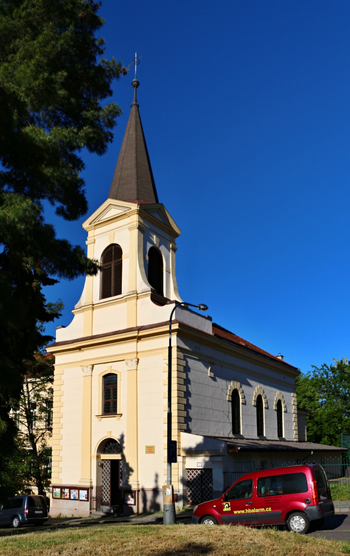 Kostel sv. Václava v Nuslích